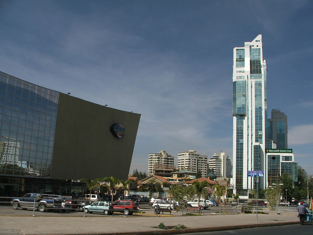 Ciudad de Cochabamba